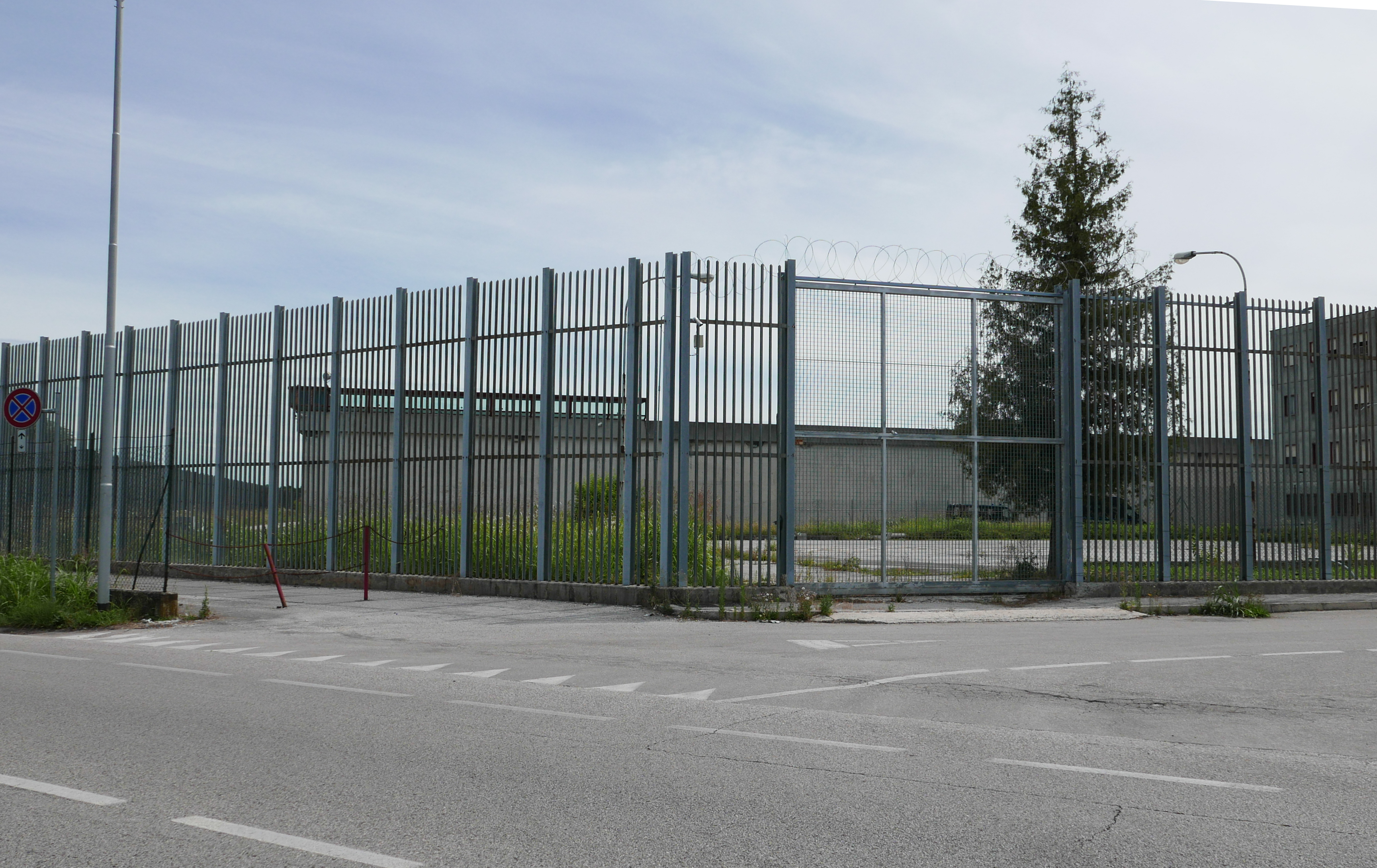 Carcere San Pio X